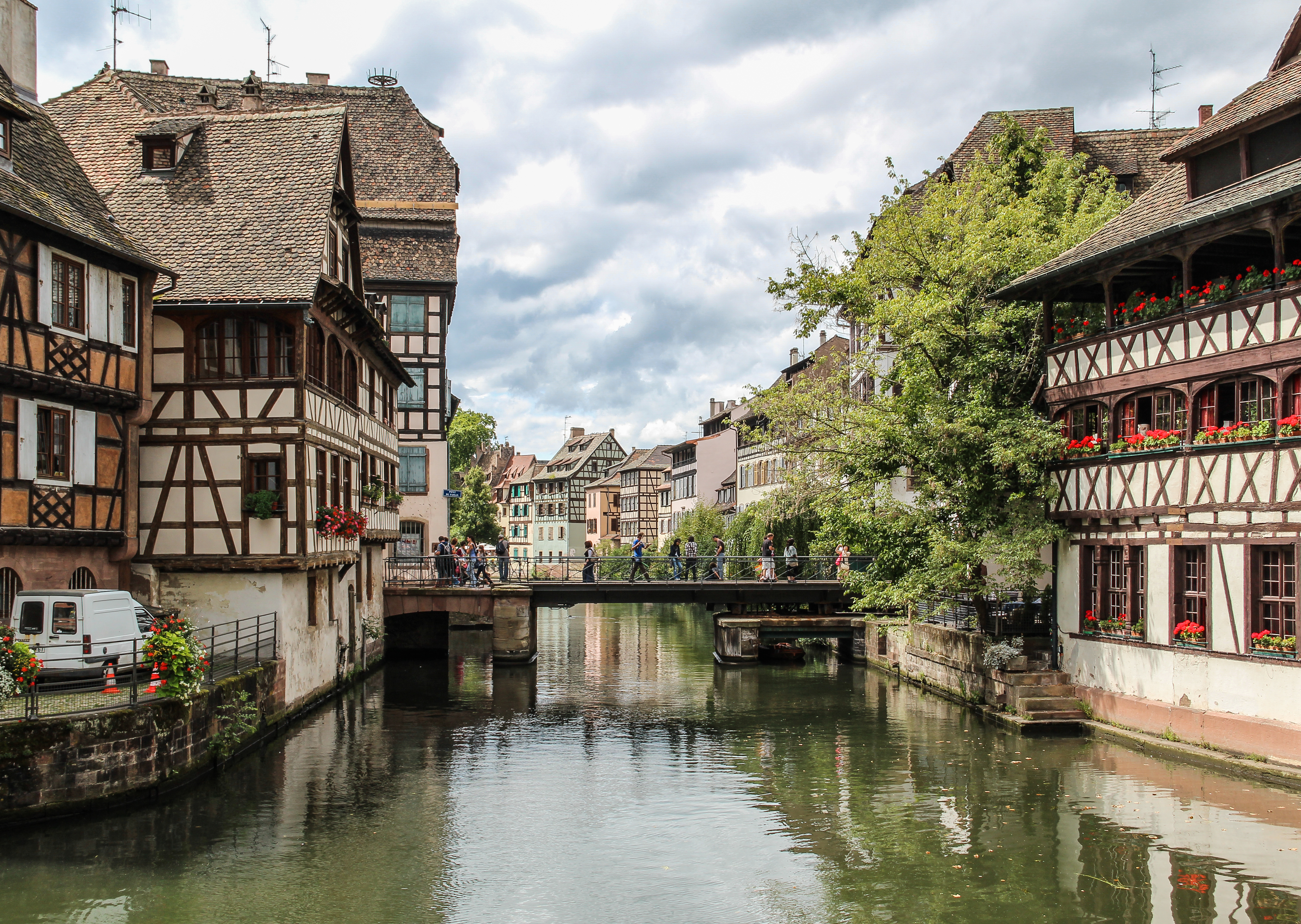 Straßburg, Frankreich